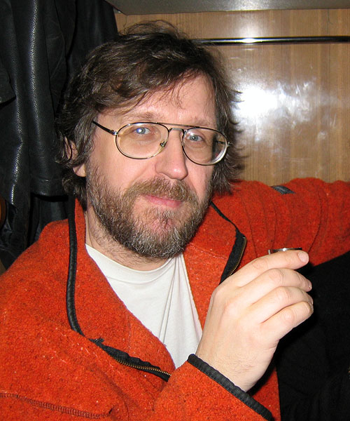 Андрей Лазарчук, писатель